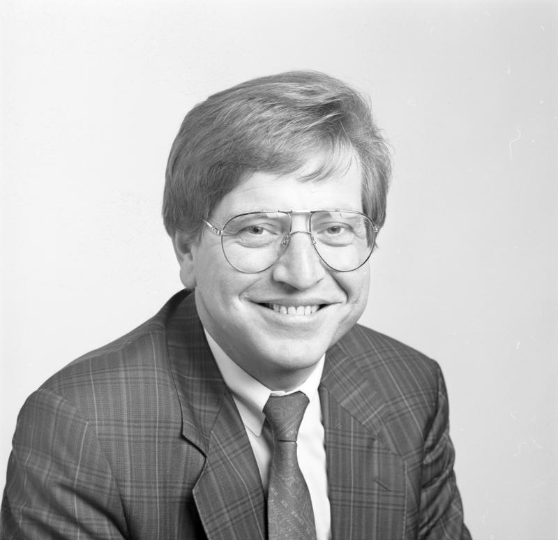 22.11.1990 Dr. Thomas Goppel Staatsminister für Bundes- und Europaangelegenheiten des Freistaates Bayern